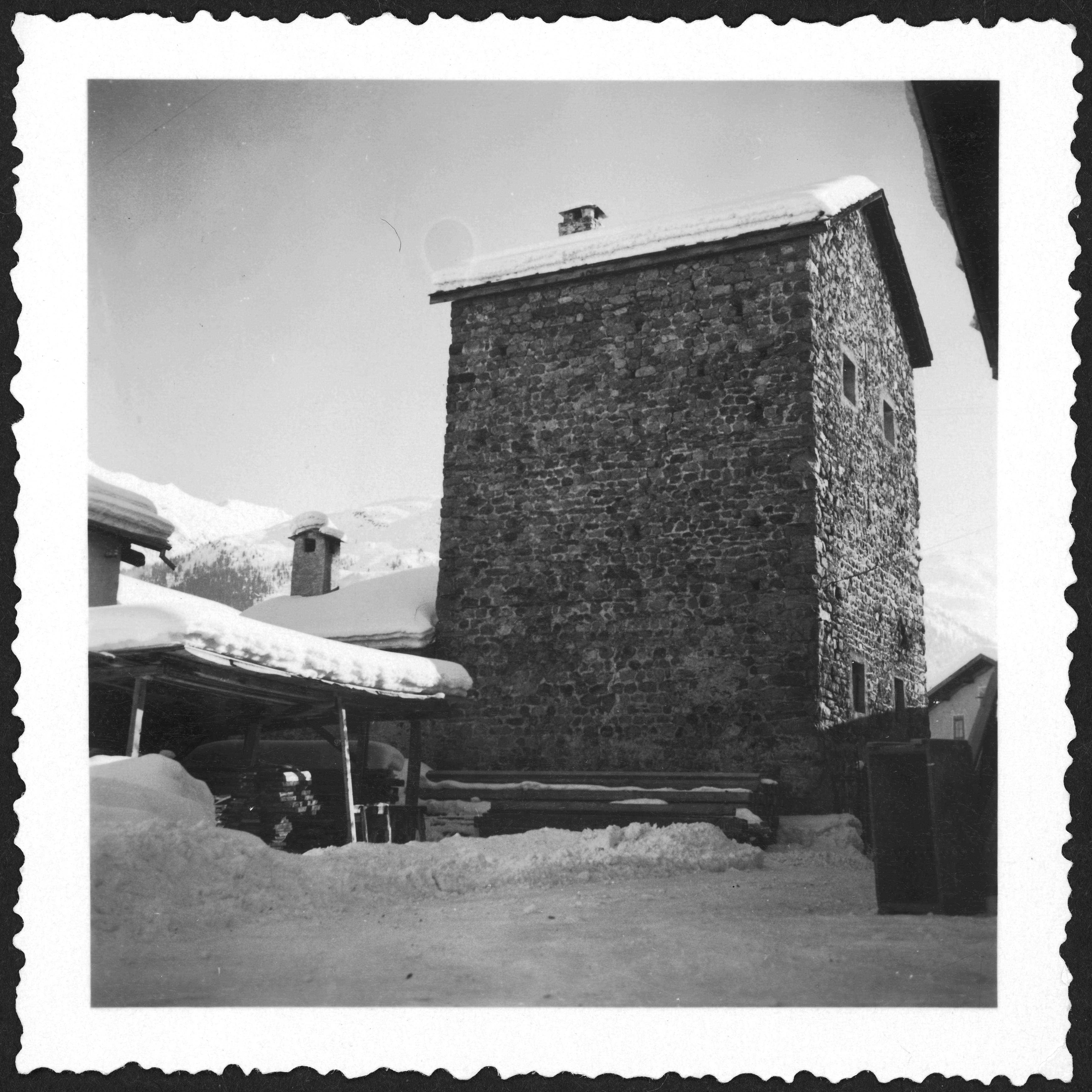 Schweiz, Samedan: Ort; Alter Backsteinturm "La Tuor"; Samedan